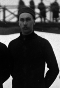 Pokalmatch på Östermalms IP i Stockholm den 24. og 25. februar 1912. Trygve Lundgreen.